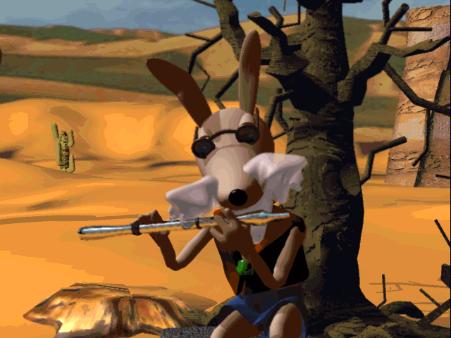 Capture d'écran du jeu vidéo Little Big Adventure (1994), développé par Adeline Software International.